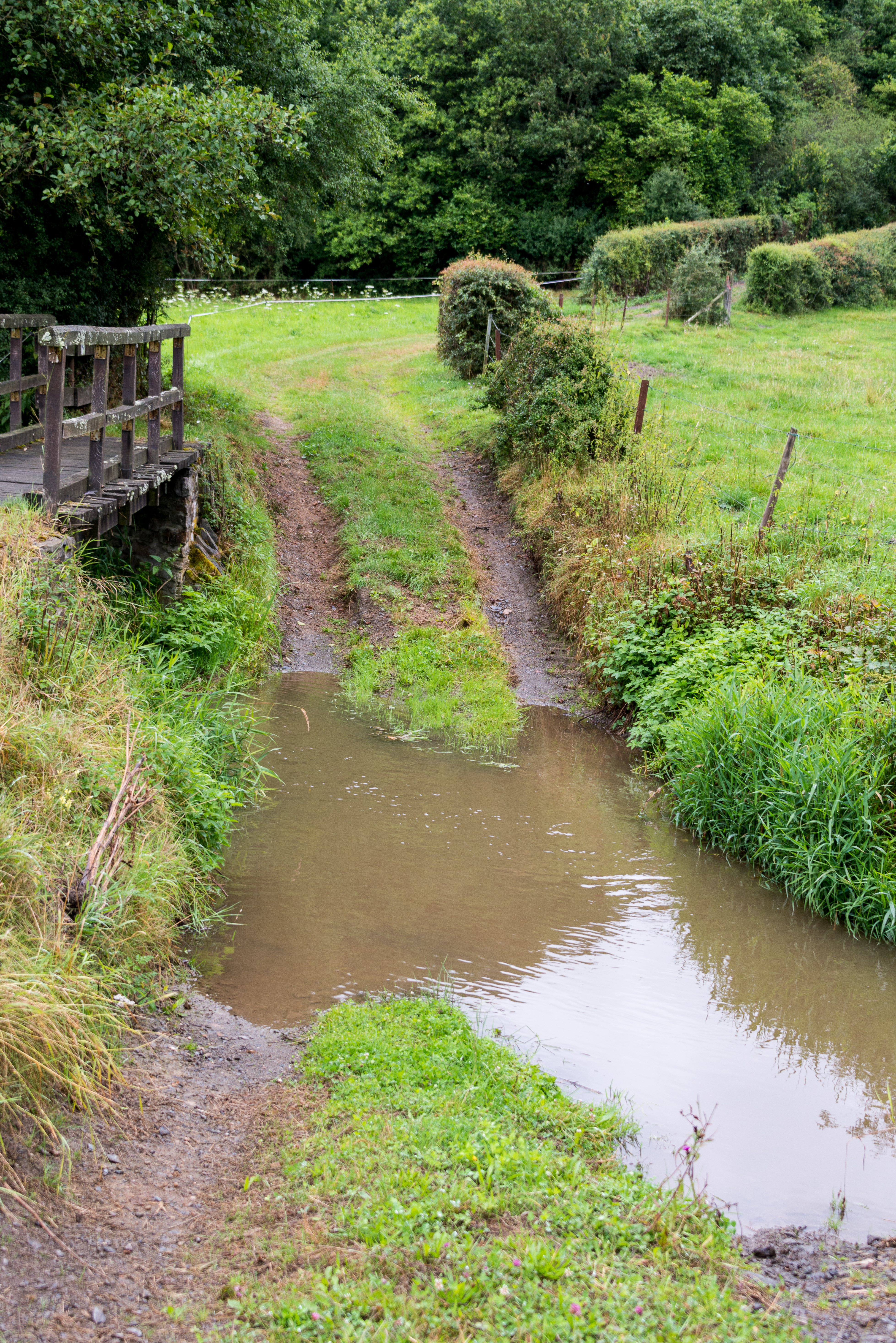 D'Fuurt bei der Pëntscherbréck zu Pënsch.